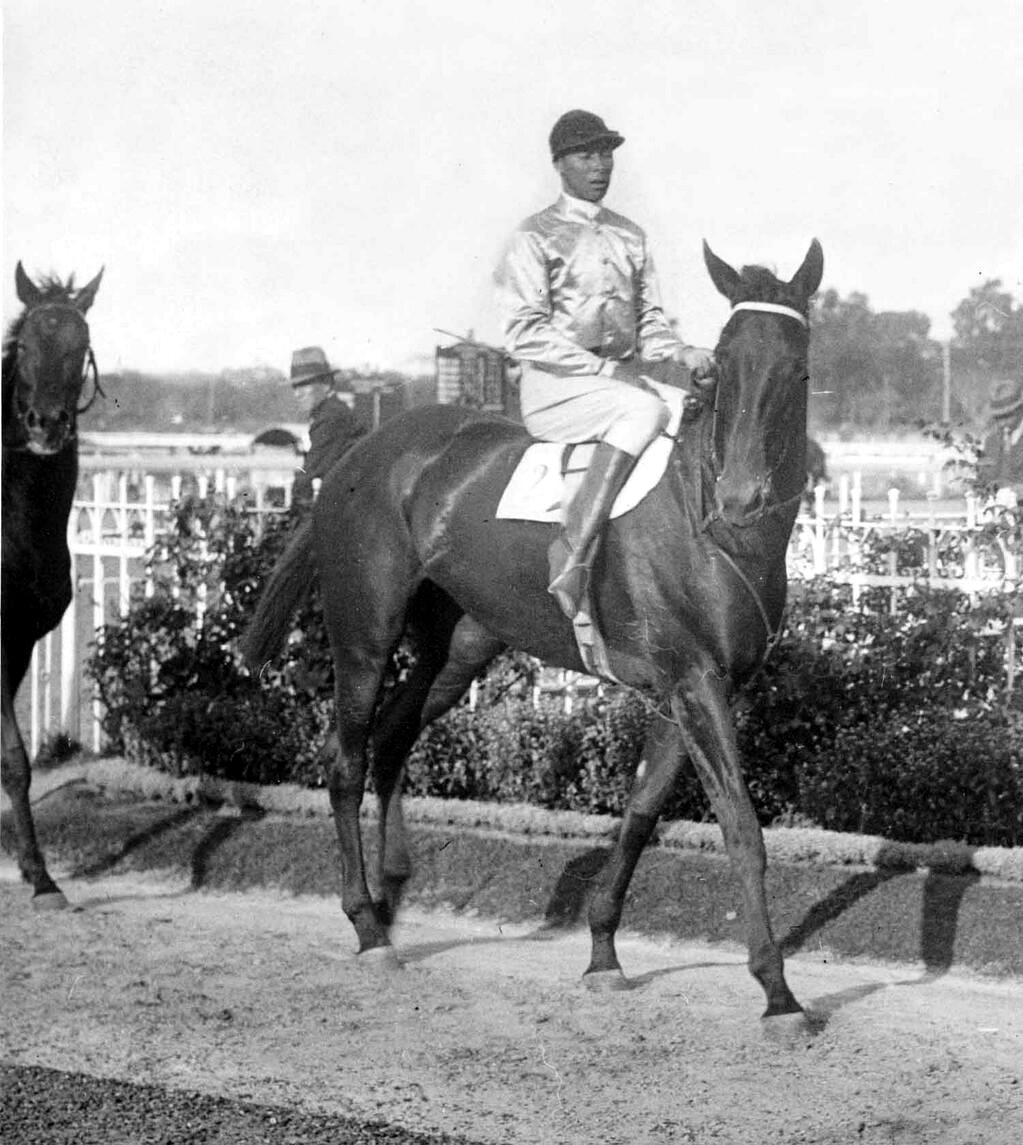 Irineo Leguisamo. Hipódromo Argentino, 1930. Inventario 161002 General Archive of the Nation Native nameArchivo General de la Nación ArgentinaLocationBuenos Aires, ArgentinaCoordinates34° 36′ 17″ S, 58° 22′ 14″ W Established28 August 1821Web pageAGNAuthority control : Q2860529 ISNI: 0000 0001 2375 5869 LCCN: n82144709 WorldCat institution QS:P195,Q2860529 This file, was provided to Wikimedia Commonsthanks to an agreement between the General Archive of the Nation of Argentina and Wikimedia Argentina.